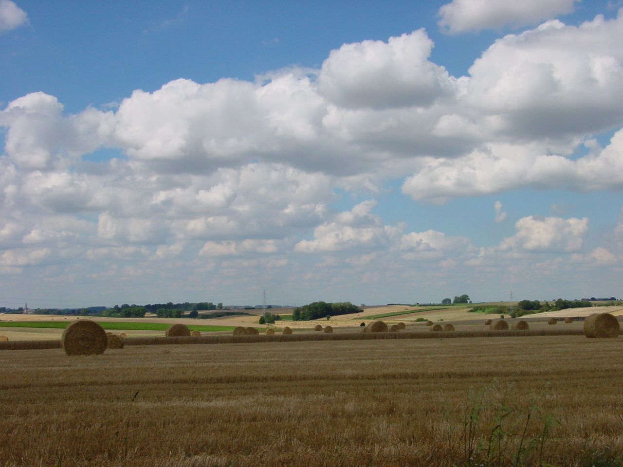 paysage d'openfield en Cambrésis (juillet)